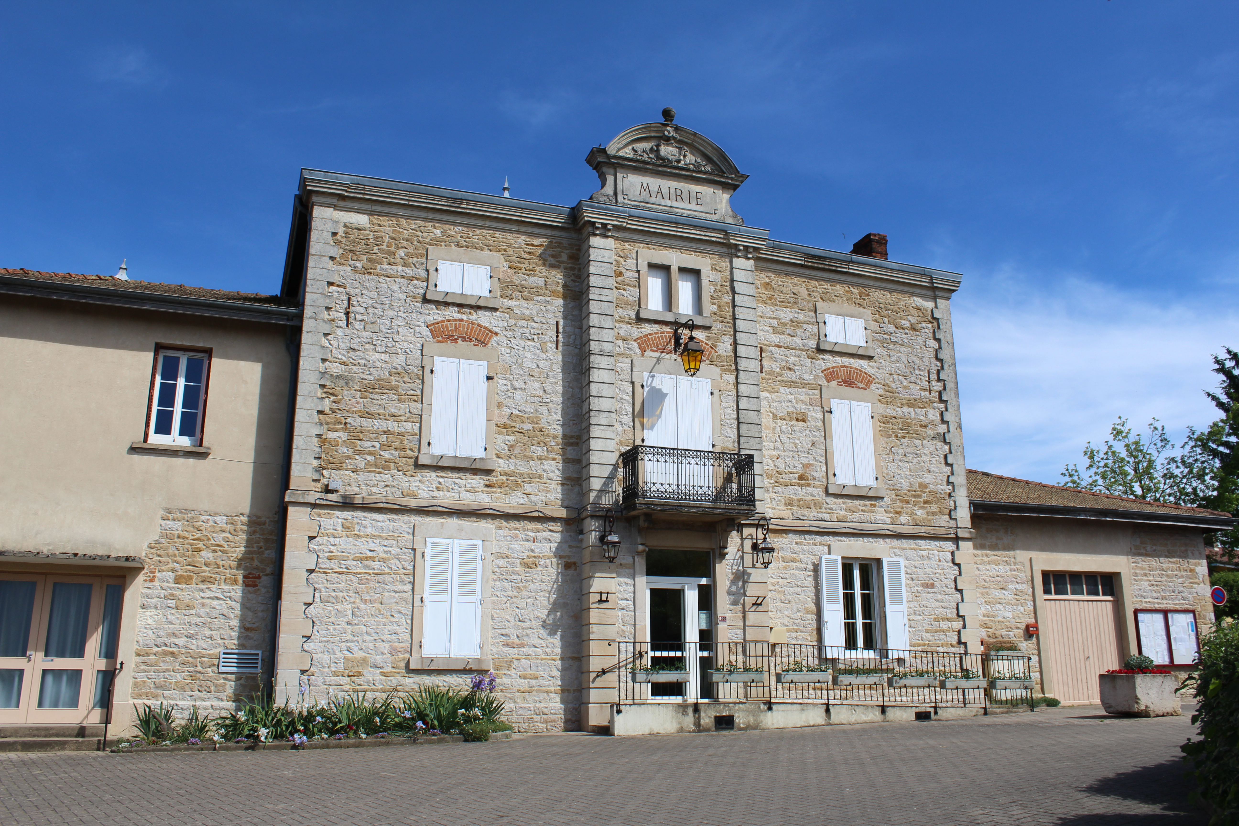 Mairie de Cormoz.